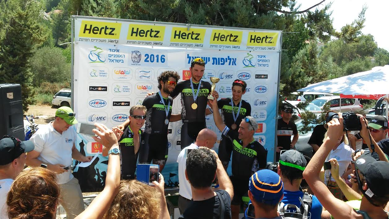 מימין לשמאל: סילבן אדמס, רועי גולדשטיין, גיא שגיב, אביב יחזקאל, רונן בראון. כל הפודיום מורכב מרוכבי קבוצת סייקלינג אקדמי